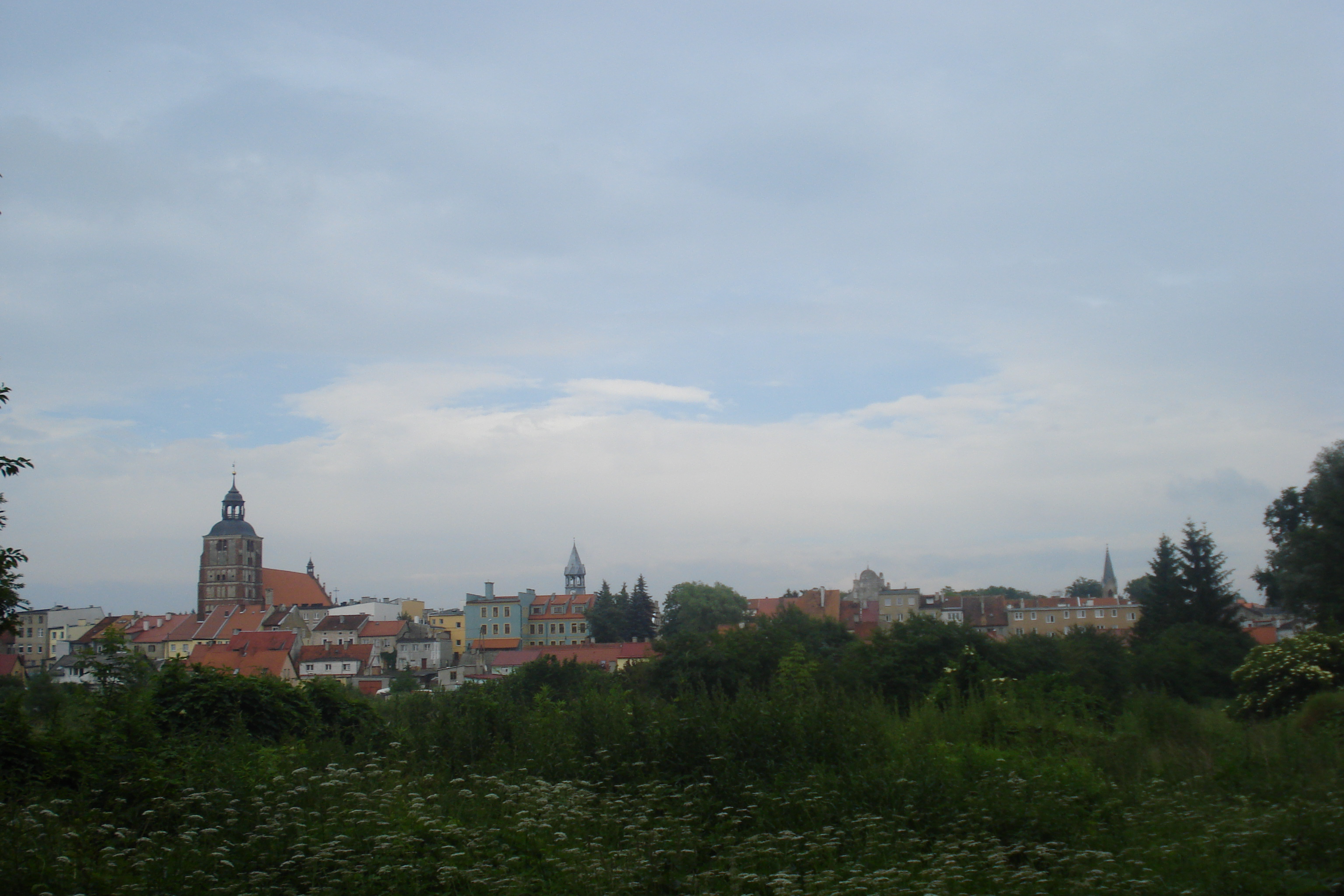 Barczewo: Stare Miasto